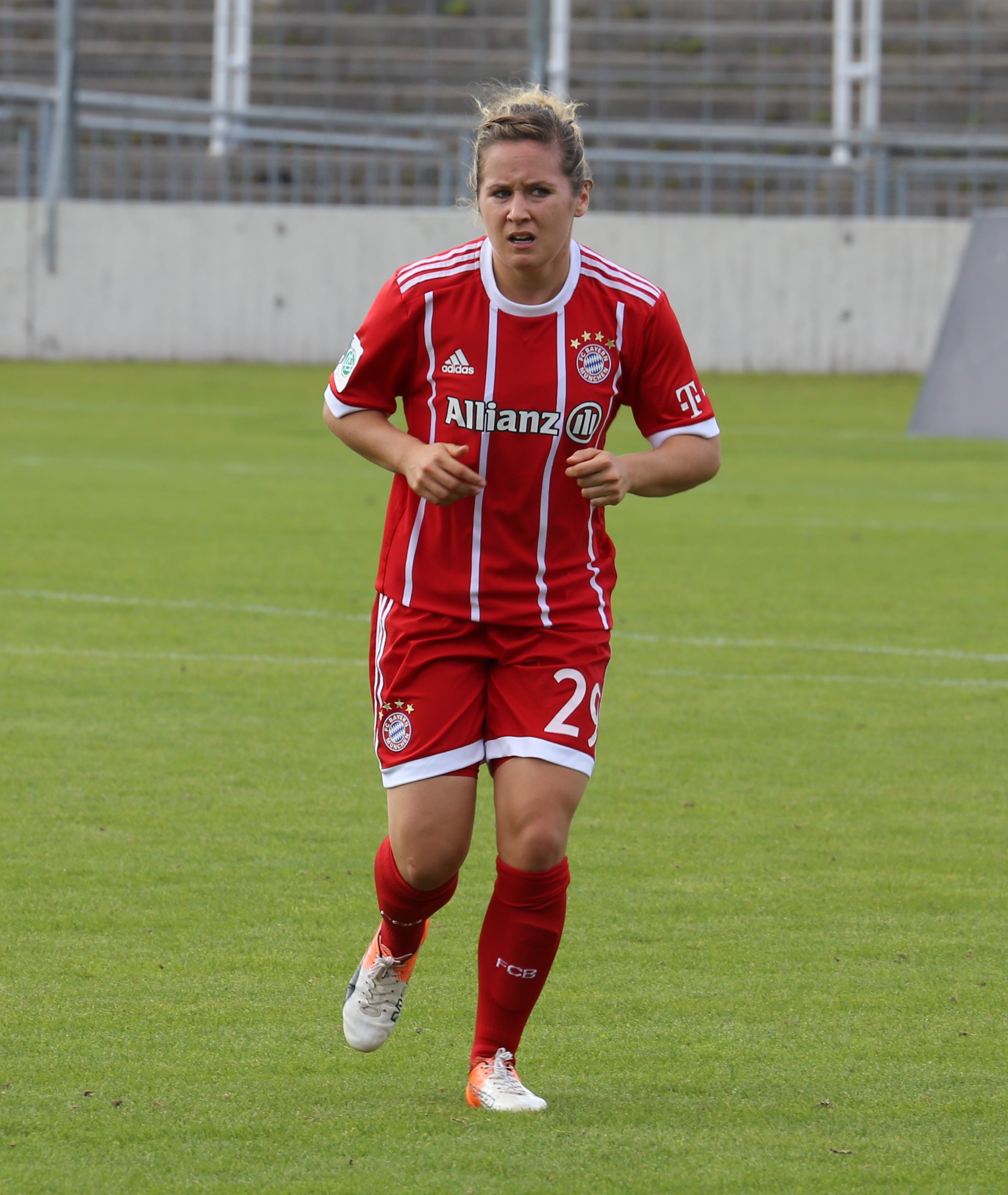 Nicole Rolser beim Frauen-Bundesliga-Spiel FC Bayern München gegen 1. FC Köln am 24. September 2017 im Stadion an der Grünwalder Straße (Ergebnis war 2:0)